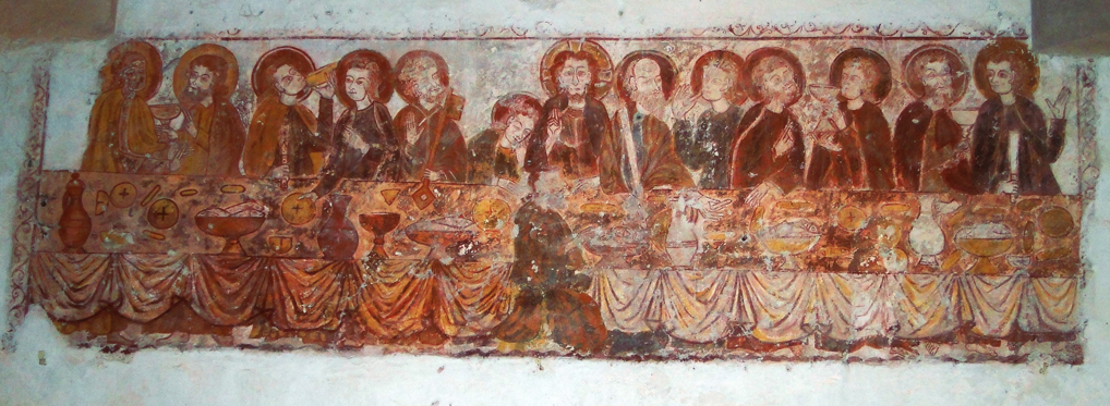 Peinture murale ornant le mur nord de la nef - comporte 14 personnages